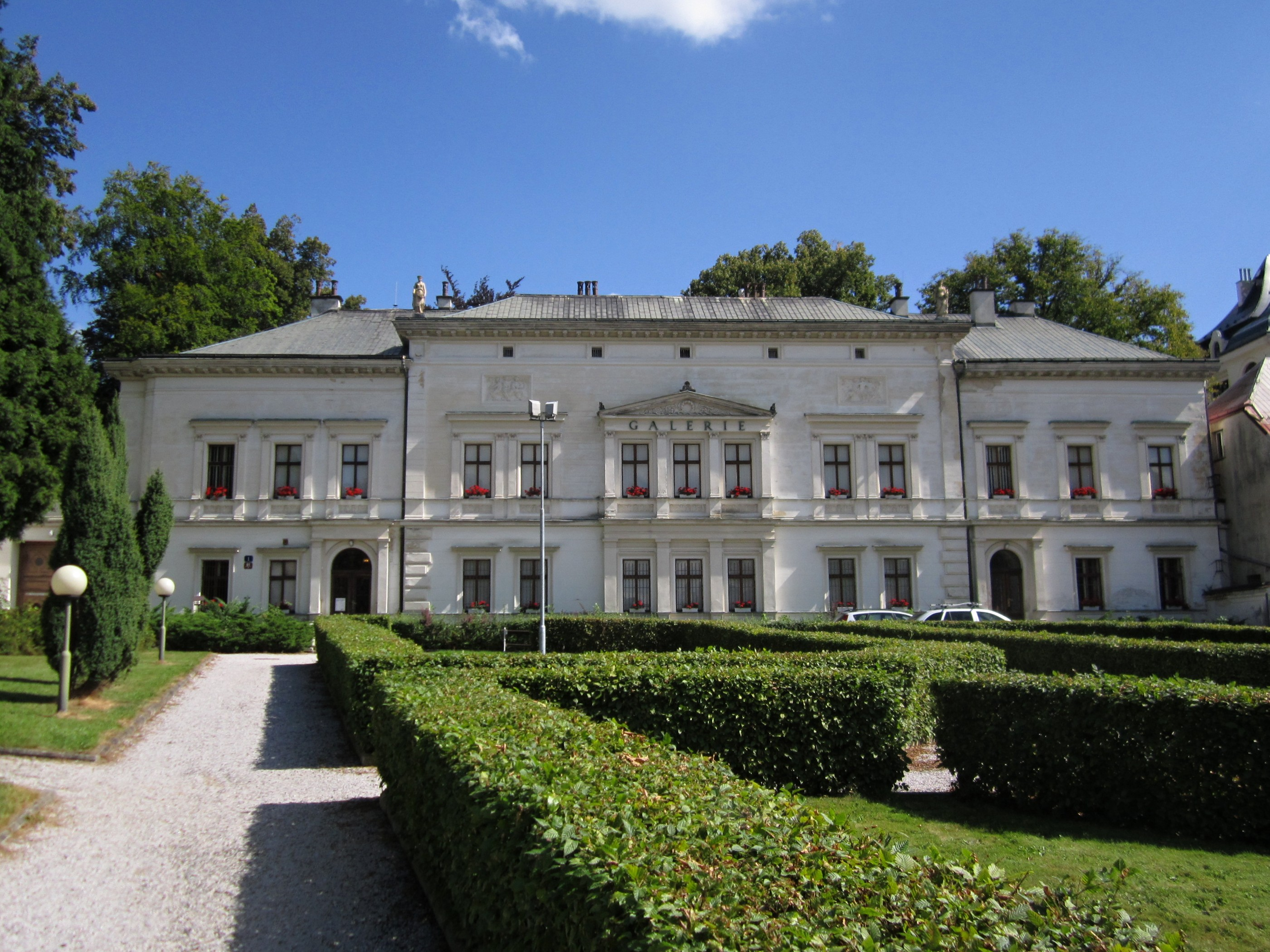 Budova, kde sídlí Oblastní galerie v Liberci, dříve vila.